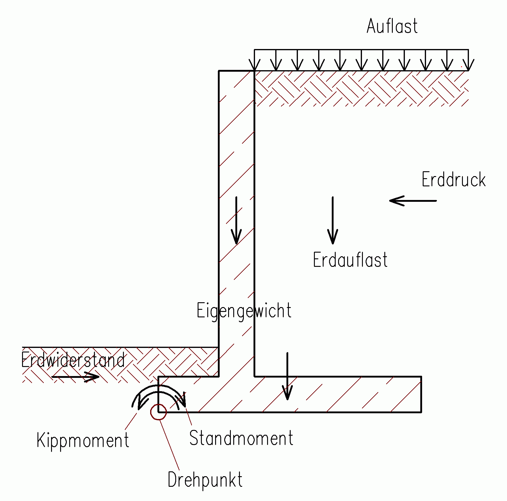 Kippsicherheit